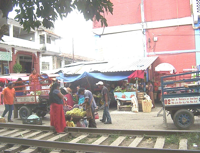 Santo Domingo Tehuantepec, México. Fotografía con cámara digital, agosto de 2006. Autor: Jesús Fernández.